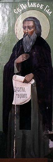 Преподобный Иаков Галичский. Изображение на северных вратах Свято-Успенского собора Паисиево-Галичского монастыря, XVII век.